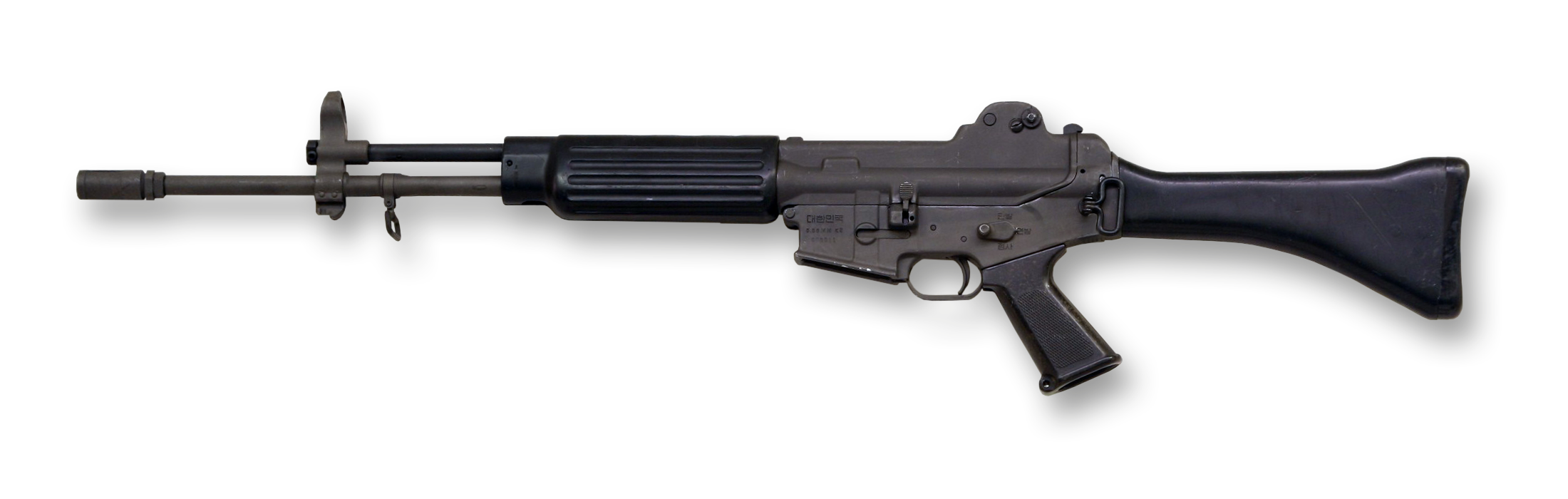 Sturmgewehr Daewoo K2 (Südkorea)